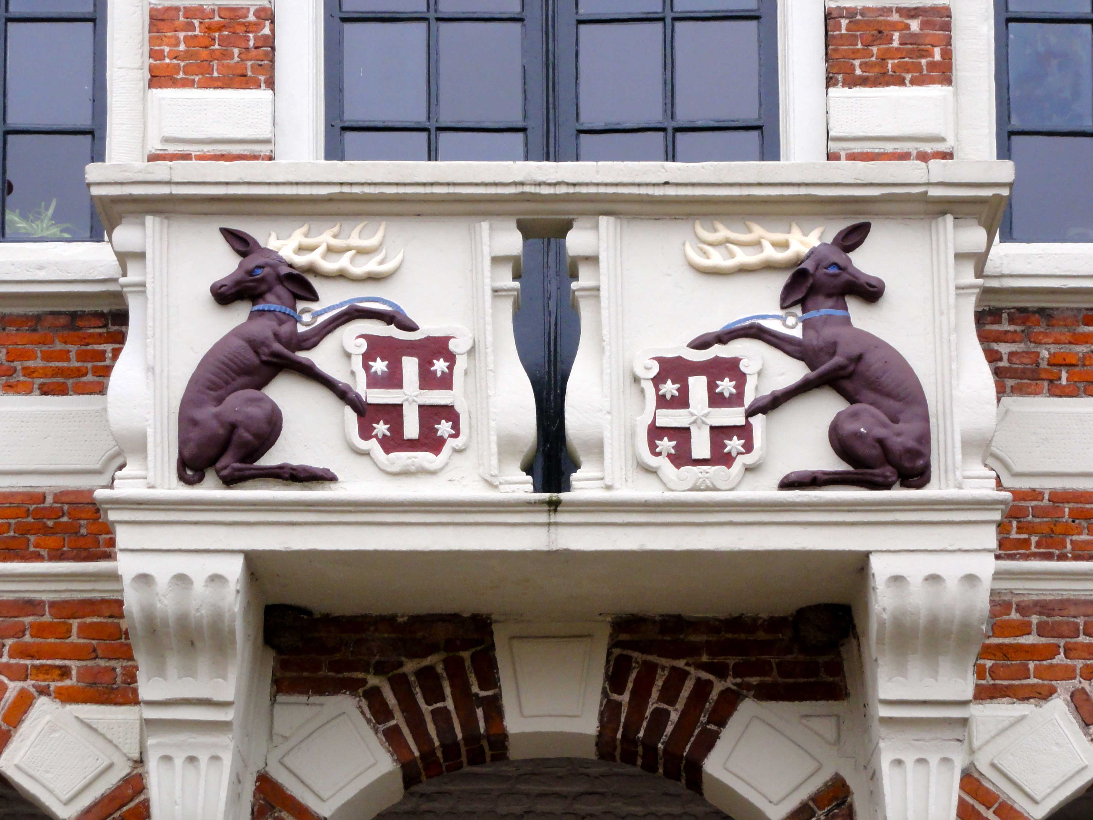 Voormalig stadhuis Vollenhove